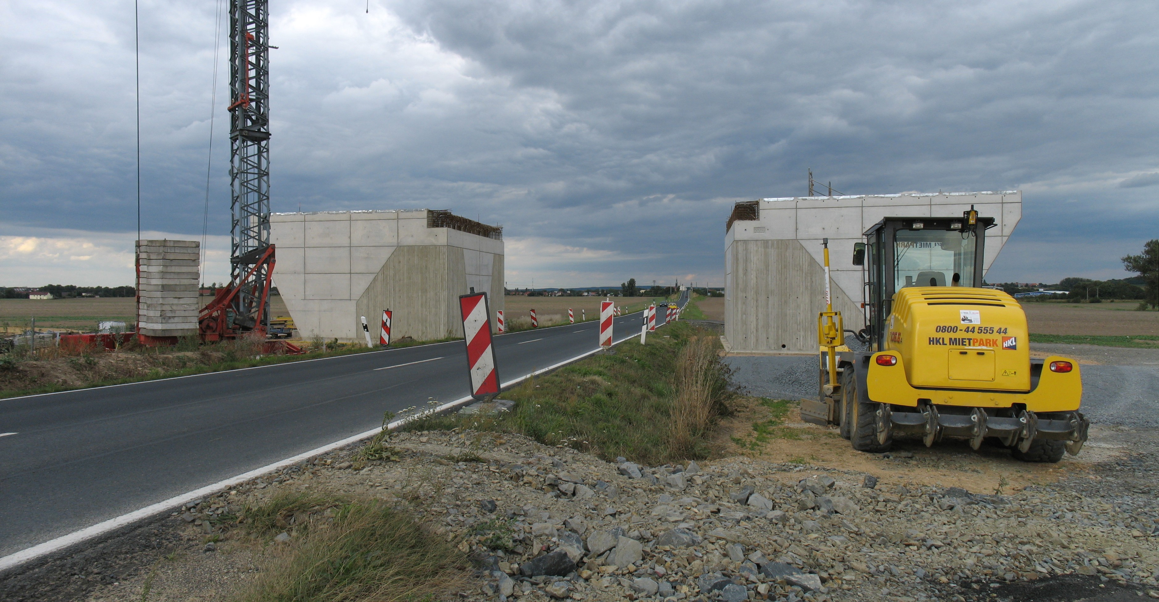 Brücke im Bau der Verbindungskurve Weißig–Böhla über die B101 bei Großenhain.